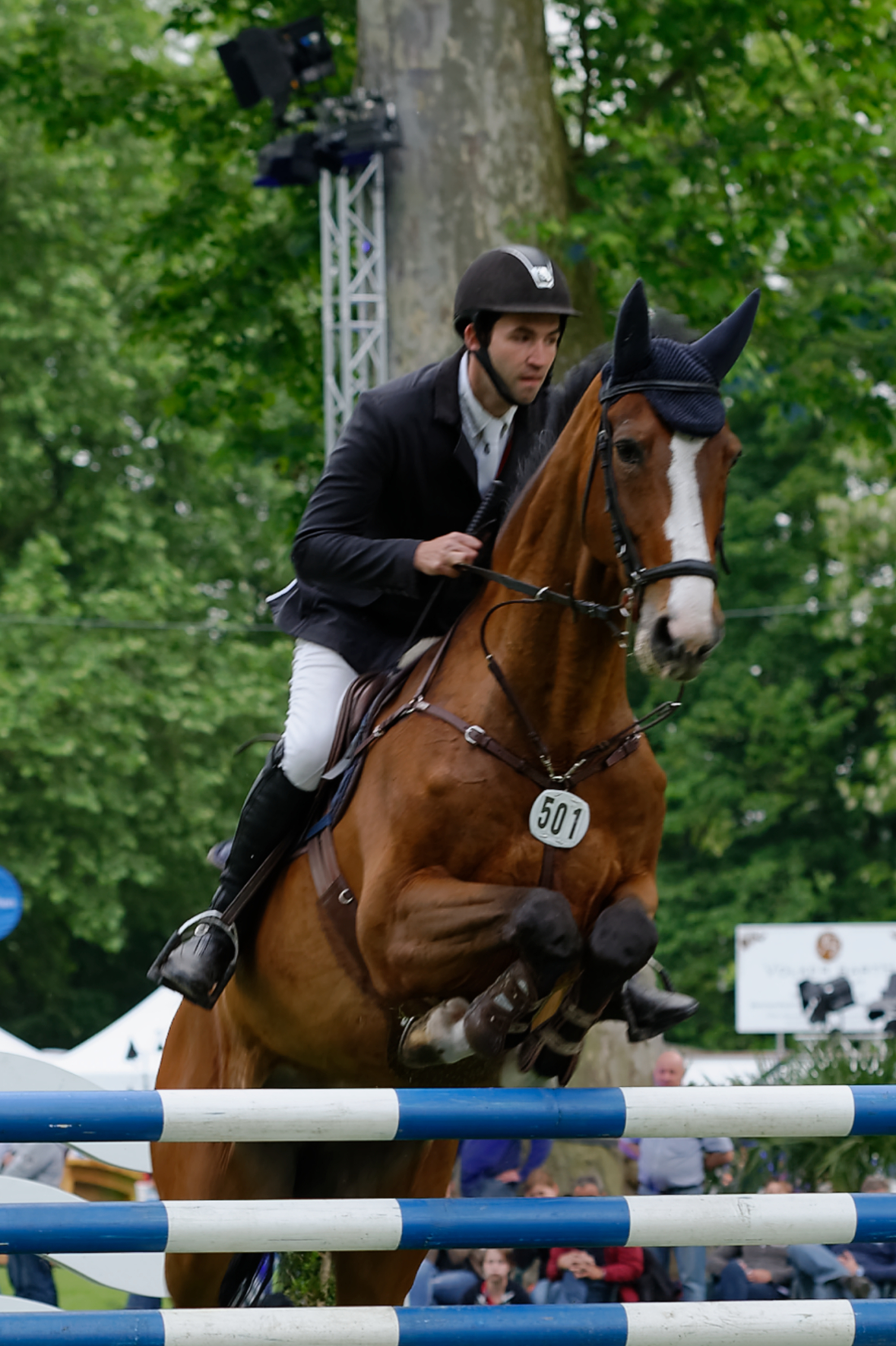 Wiesbaden Pferdenacht Christian Glienewinkel auf Professional Aircare